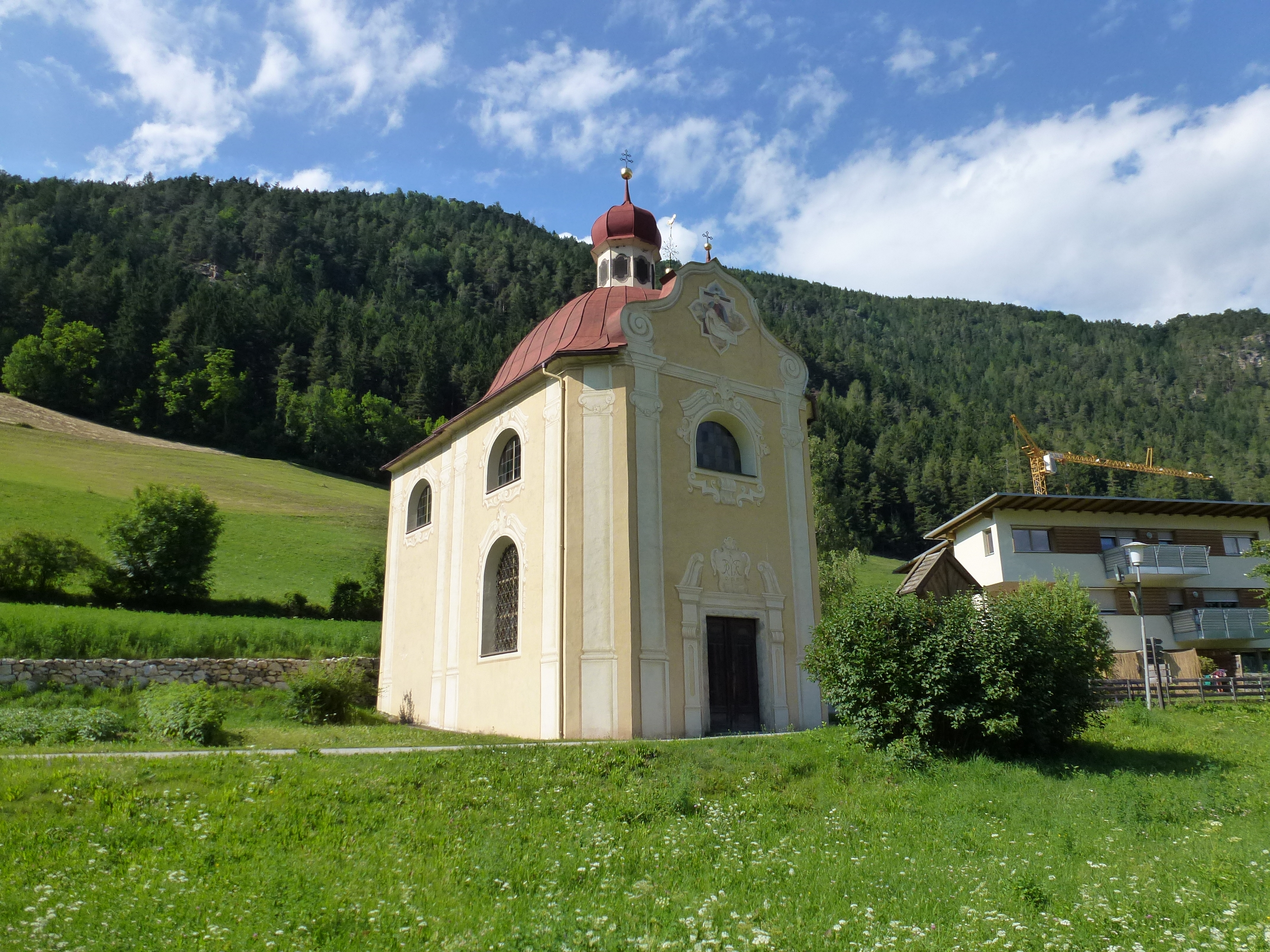 Unsere Liebe Frau im Stöckl in St. Sigmund (Gemeinde Kiens, Südtirol)